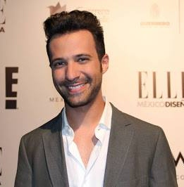 El conductor Rodrigo Massa en la premiere de la 3ra temporada de México Diseña.